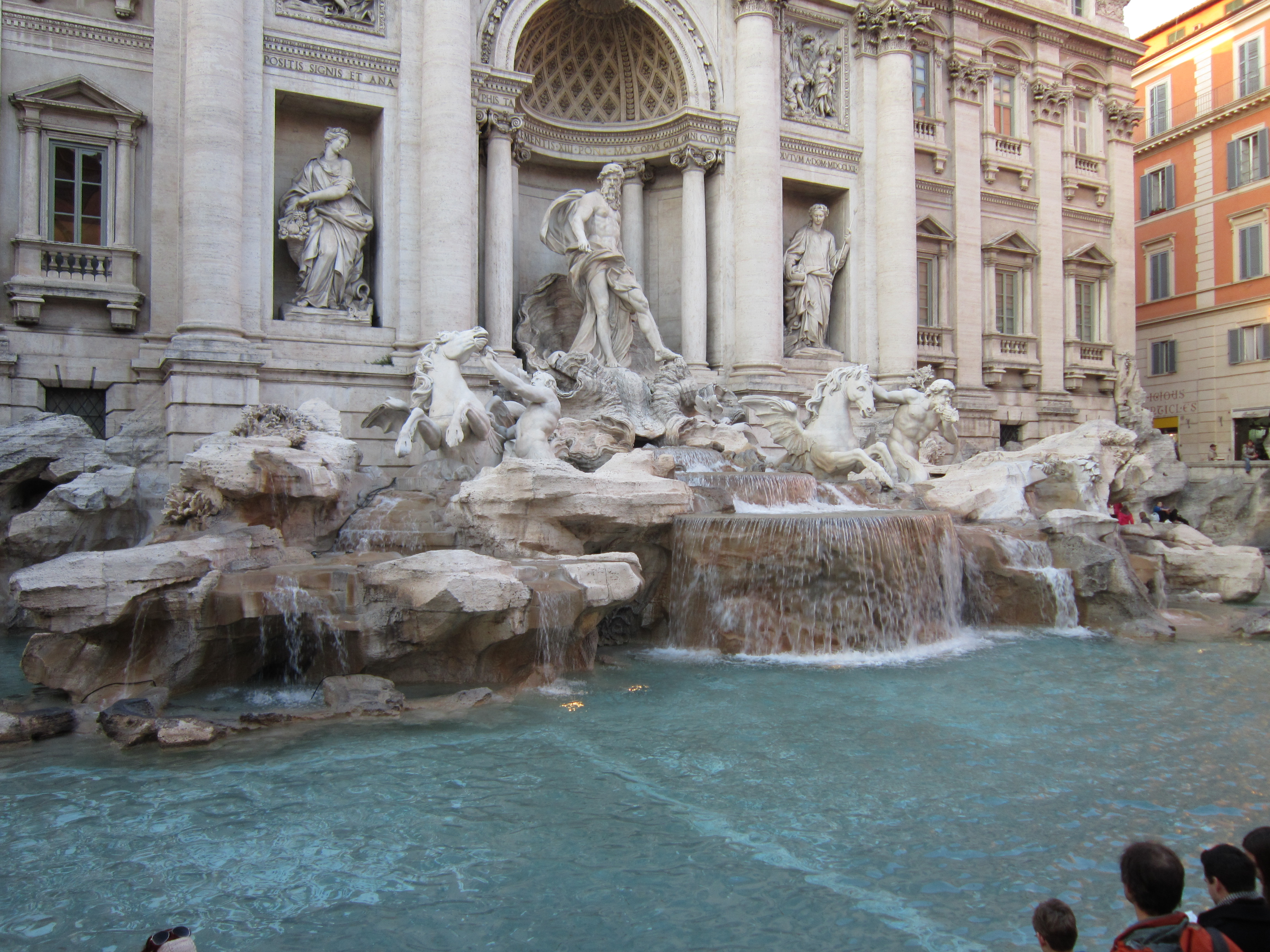 Fontaine de Trevi 1